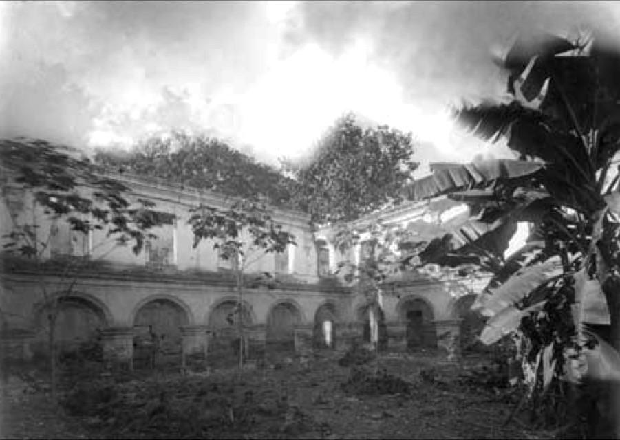 Interior del patio del colegio de la Compañía de Jesus.